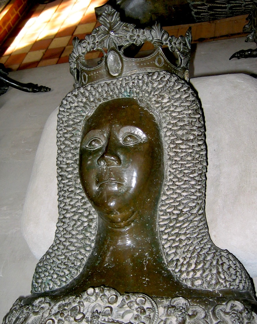 Królowa Danii Eufemia pomorska, fragment grobowca królowej w Sorø/Queen of Denmark Euphemia of Pomerania, detail of her tomb at Sorø